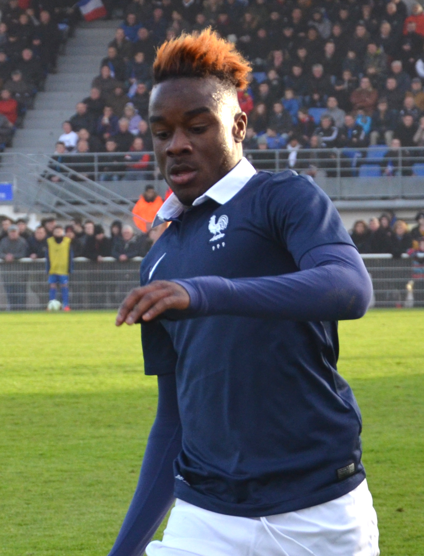 Photographie prise lors du match opposant la France à l'Angleterre pour les qualifications du championnat d'Europe de football des moins de 19 ans 2015 au stade Louis-Villemer de Saint-Lô le 31 mars 2015. Ici, Maxwell Cornet.